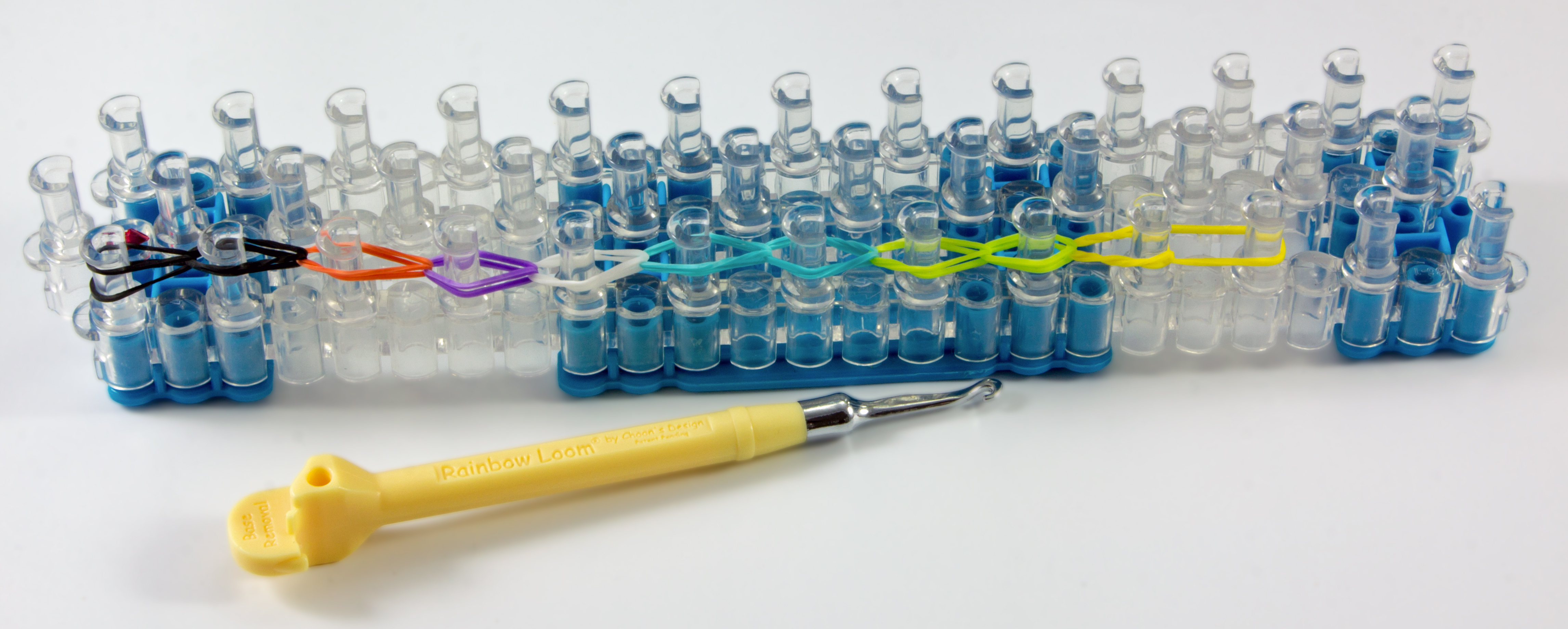 Rainbow Loom - Webstuhl mit eigenen Gummis, Häkelnadel